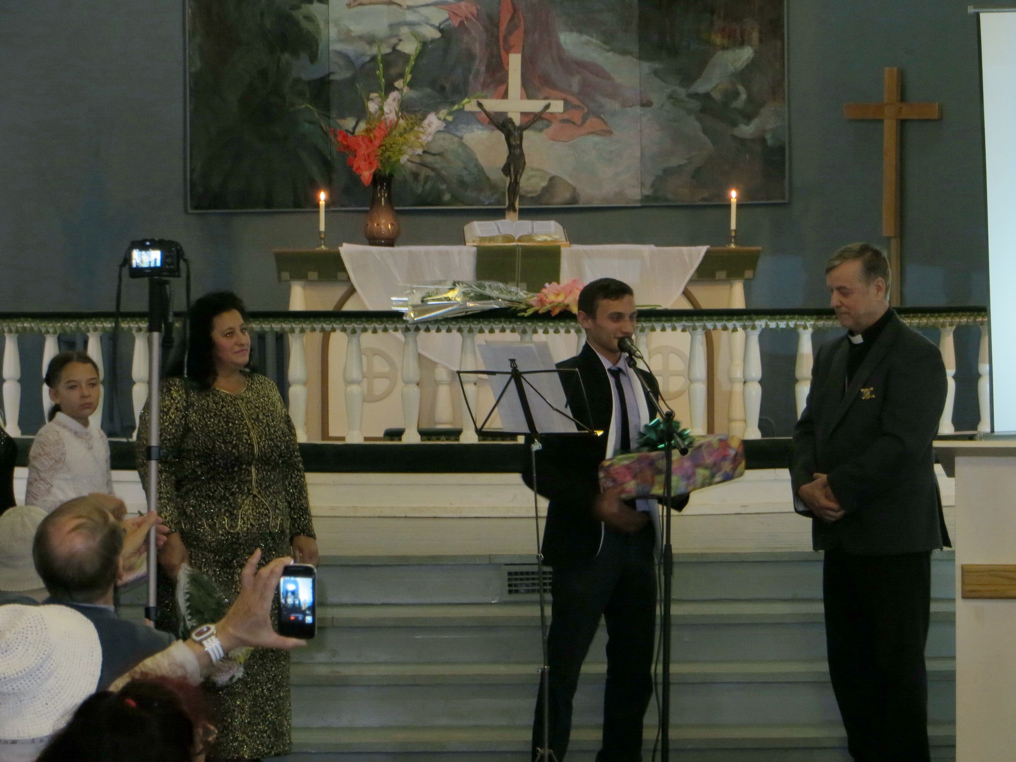 60-летний юбилей Арво Сурво в Губаницкой церкви.